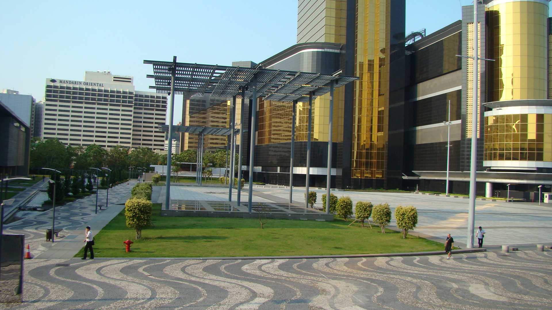 Praca do Centro Cultural